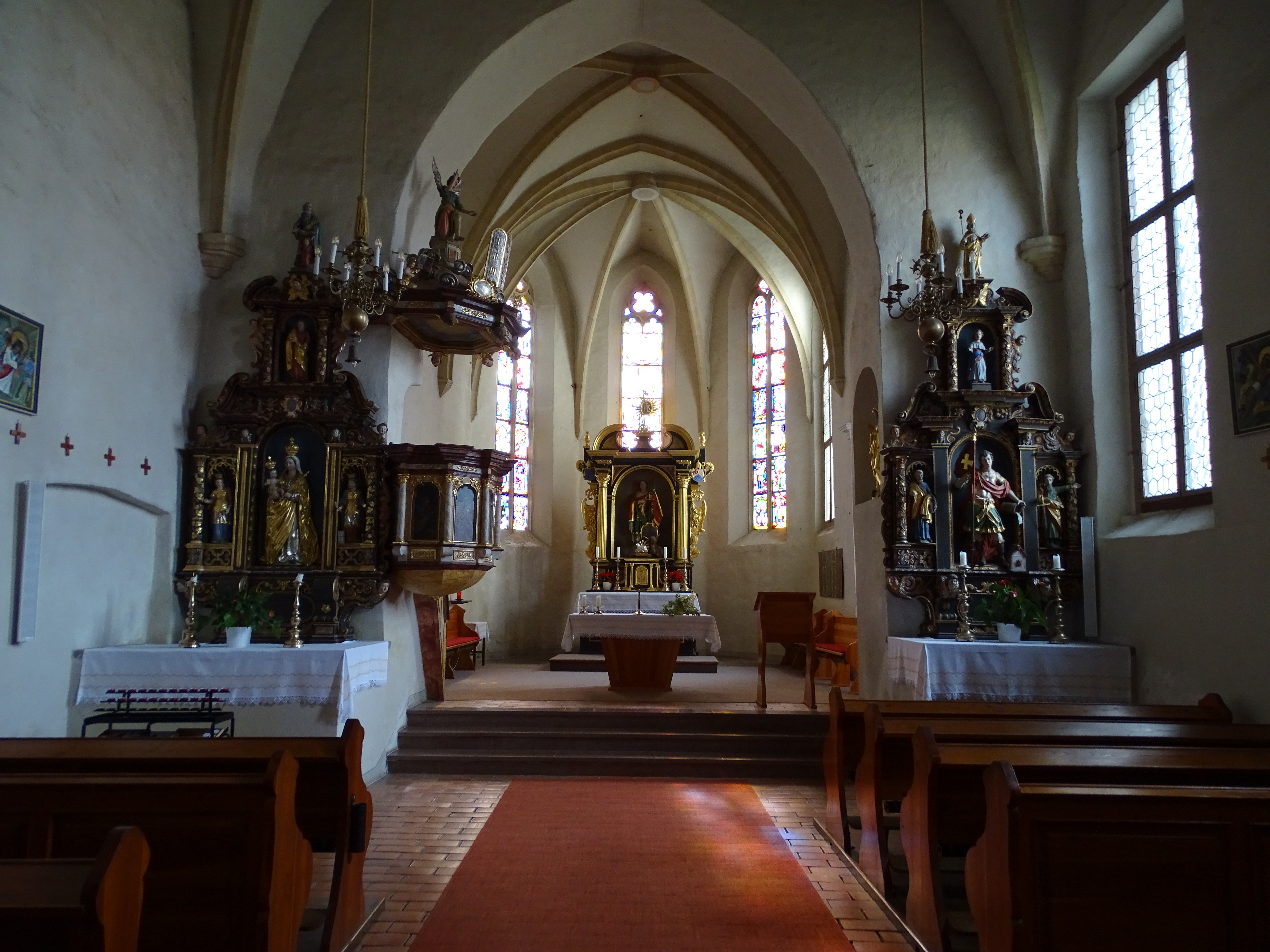 Innenansicht der Pfarrkirche von Sankt Pankrazen in Gratwein-Straßengel